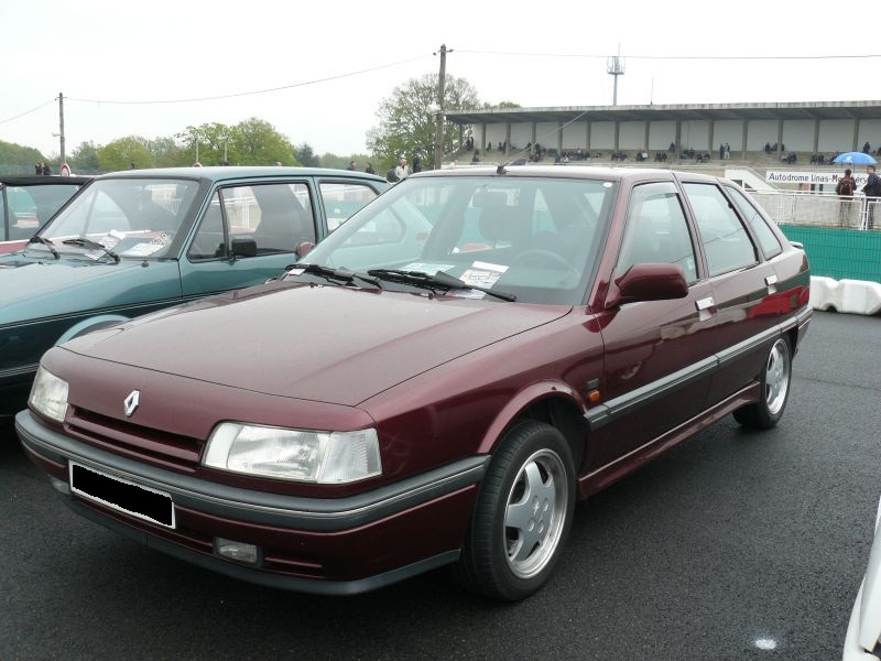 Français cadien: Montlhery Avril 2012